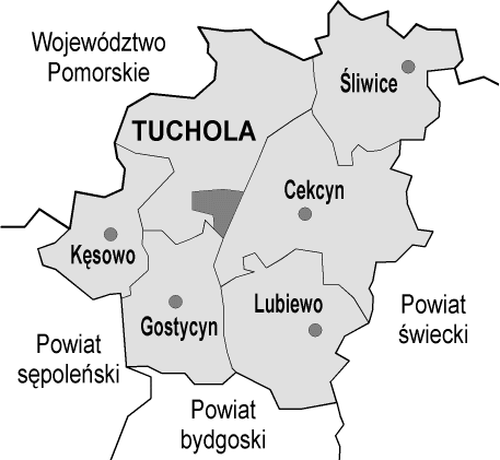 Mapka powiatu tucholskiego